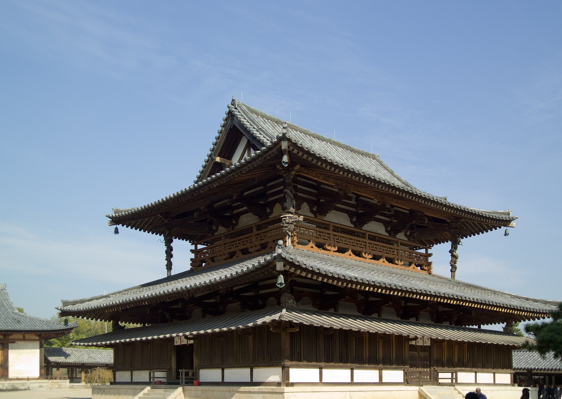 Hōryū-ji 法隆寺 Ikaruga Nara Prefecture Japan 奈良県生駒郡斑鳩町